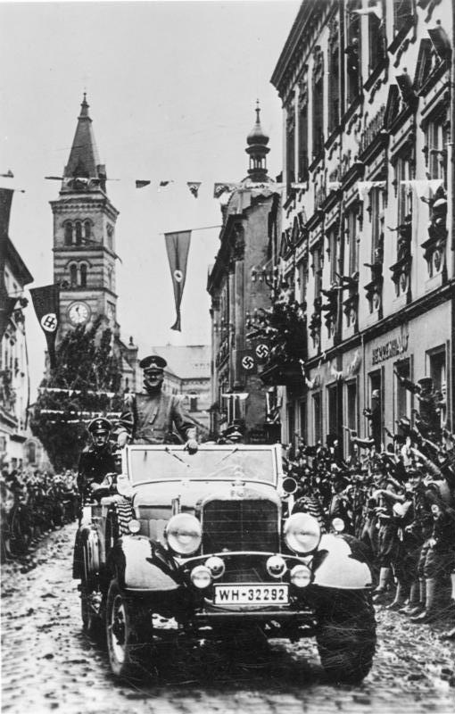 Der Führer in Graslitz Abgebildete Personen: Hitler, Adolf: Reichskanzler, Deutschland